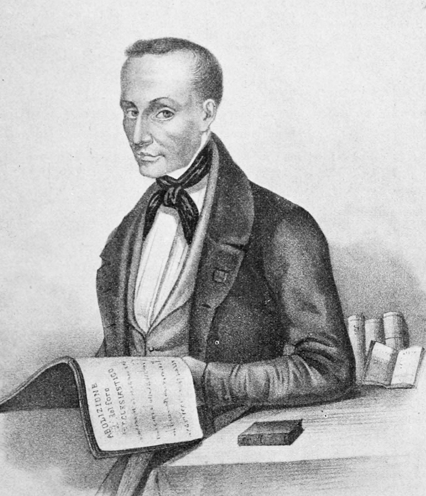 Ritratto di Giuseppe Siccardi